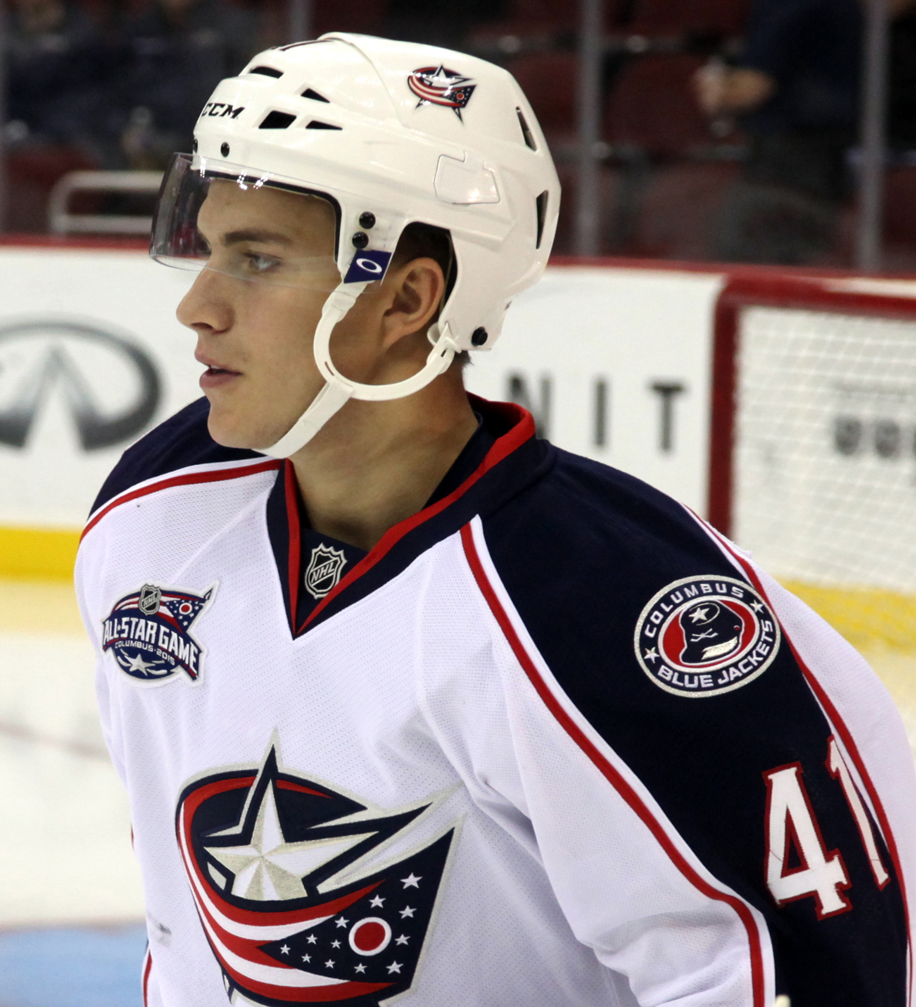 Alexander Wennberg in November 2014.